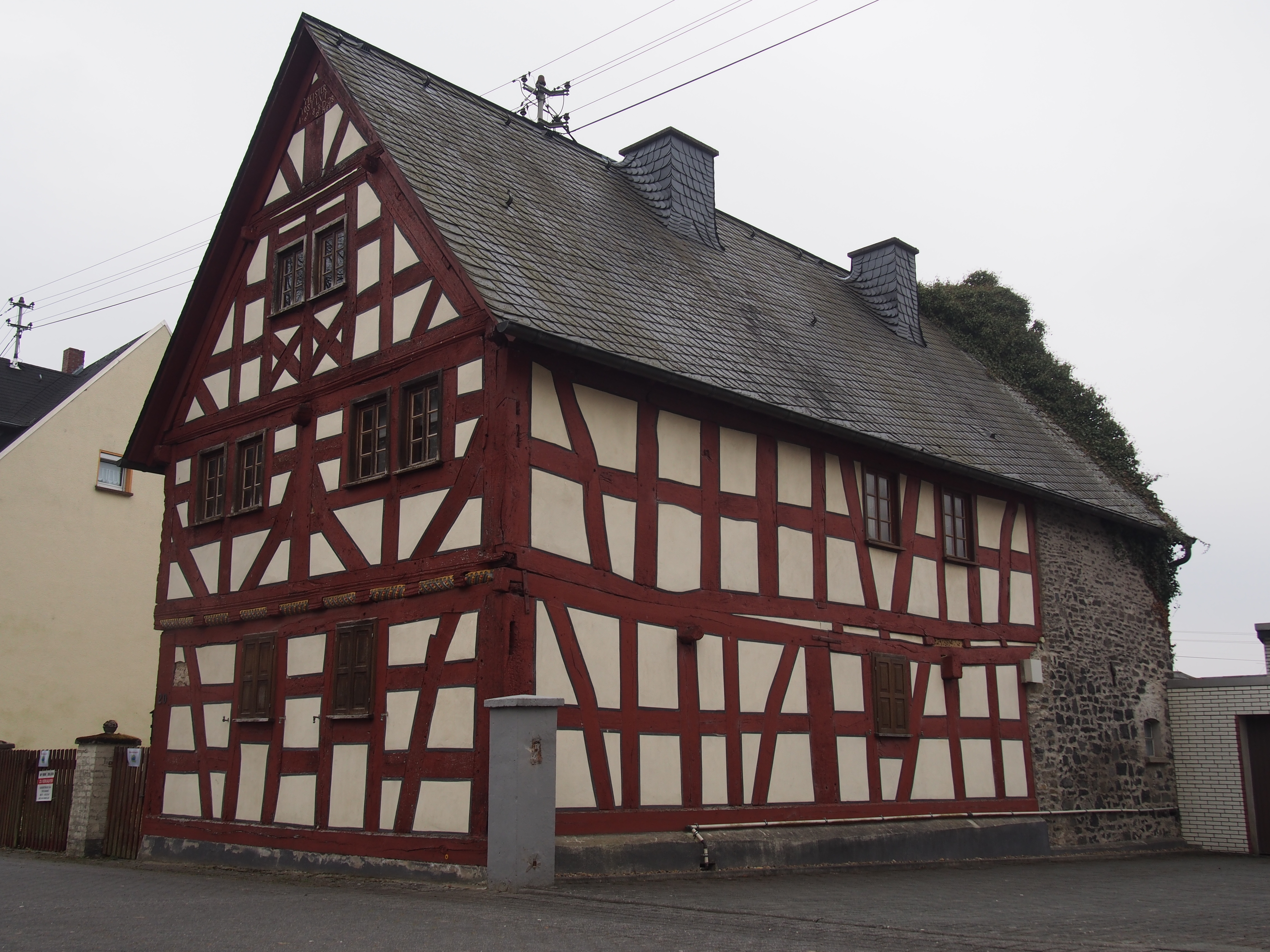 Das Fachwerkhaus wurde 1688 zuerst bezeichnet. Es ist das dritte Kulturdenkmal des Dorfes.